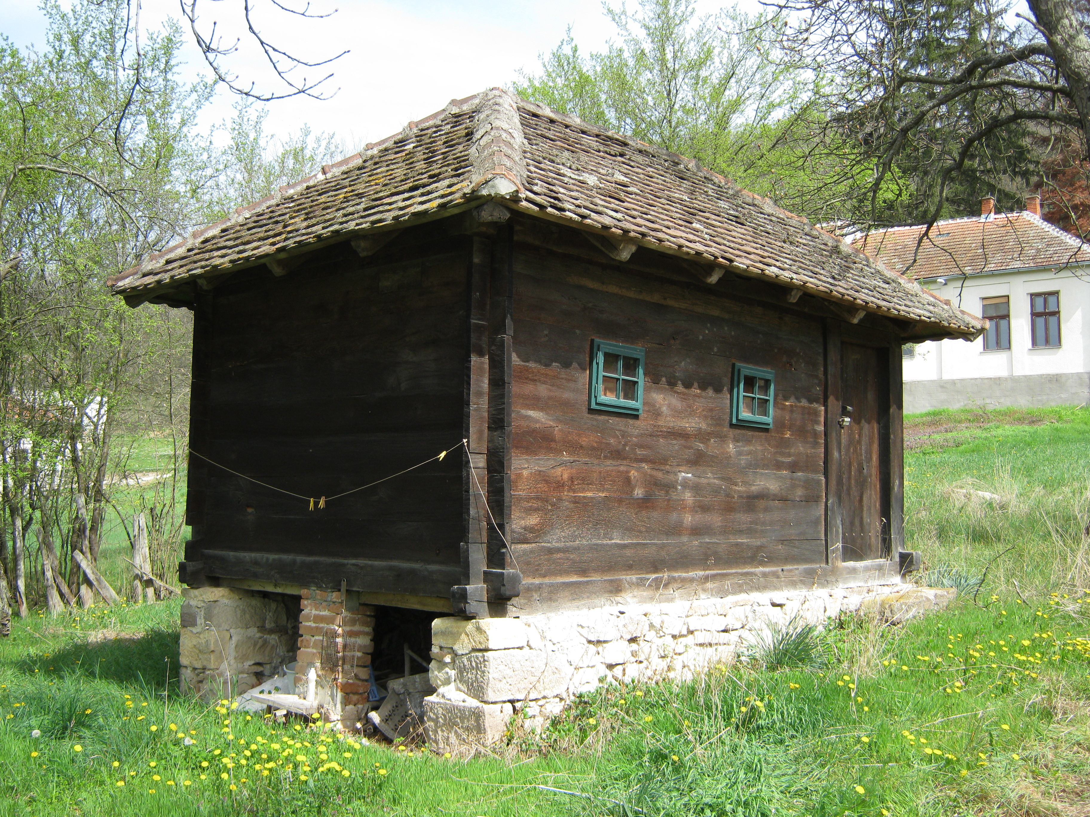 Vajat kod kuće bana Matkovića, Šarani.